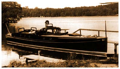 M/S Loris_vid_konkursauktionen,_1932